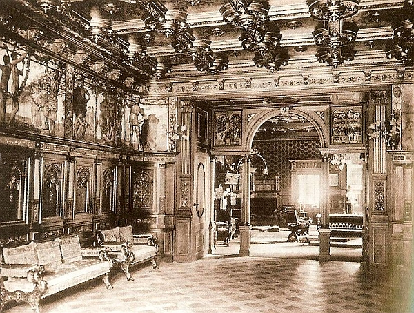 Interieur des Palais Pringsheim, Arcisstrasse 12 in München. Inneneinrichtung von Joh. Wachter und Hofmöbelfabrikant O. Fritsche in München. 1890 bezog der Mathematiker und bedeutende Kunstsammler Alfred Pringsheim mit seiner Familie diese Neo-Renaissance-Villa. sie wurde 1935 von den Nationalsozialisten enteignet und wich um 1938 einem Neubau, dem F weichen.